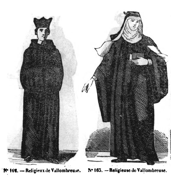 Dessins de costumes religieux dans le dictionnaire des ordres religieux, ou Histoire des ordres monastiques, religieux et militaires et des congrégations séculières de l'un et de l'autre sexe, qui ont été établies jusqu'à présent.... T. 3 / par le R. P. Hélyot